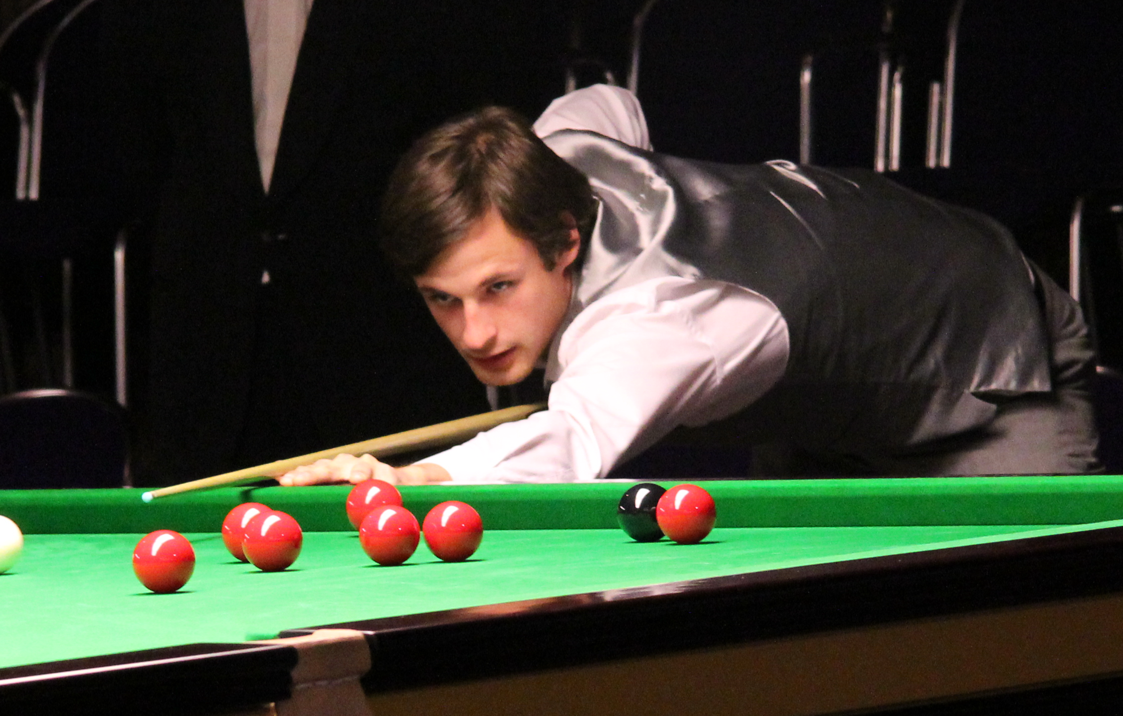 David Gilbert beim Paul Hunter Classic 2011